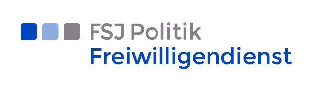 Logo des FSJ Politiks